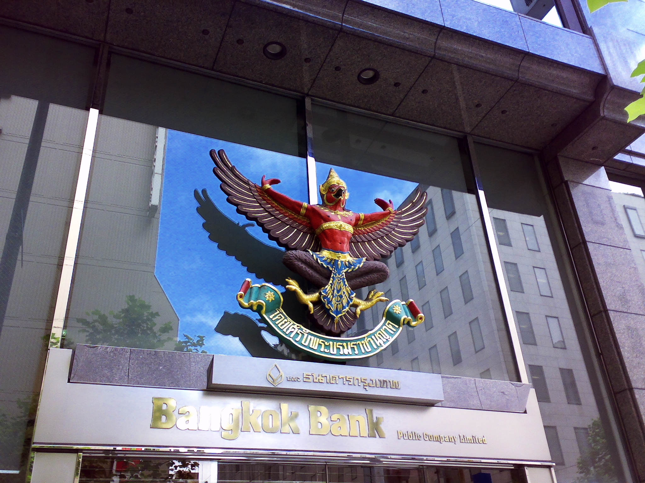 Bangkok Bank